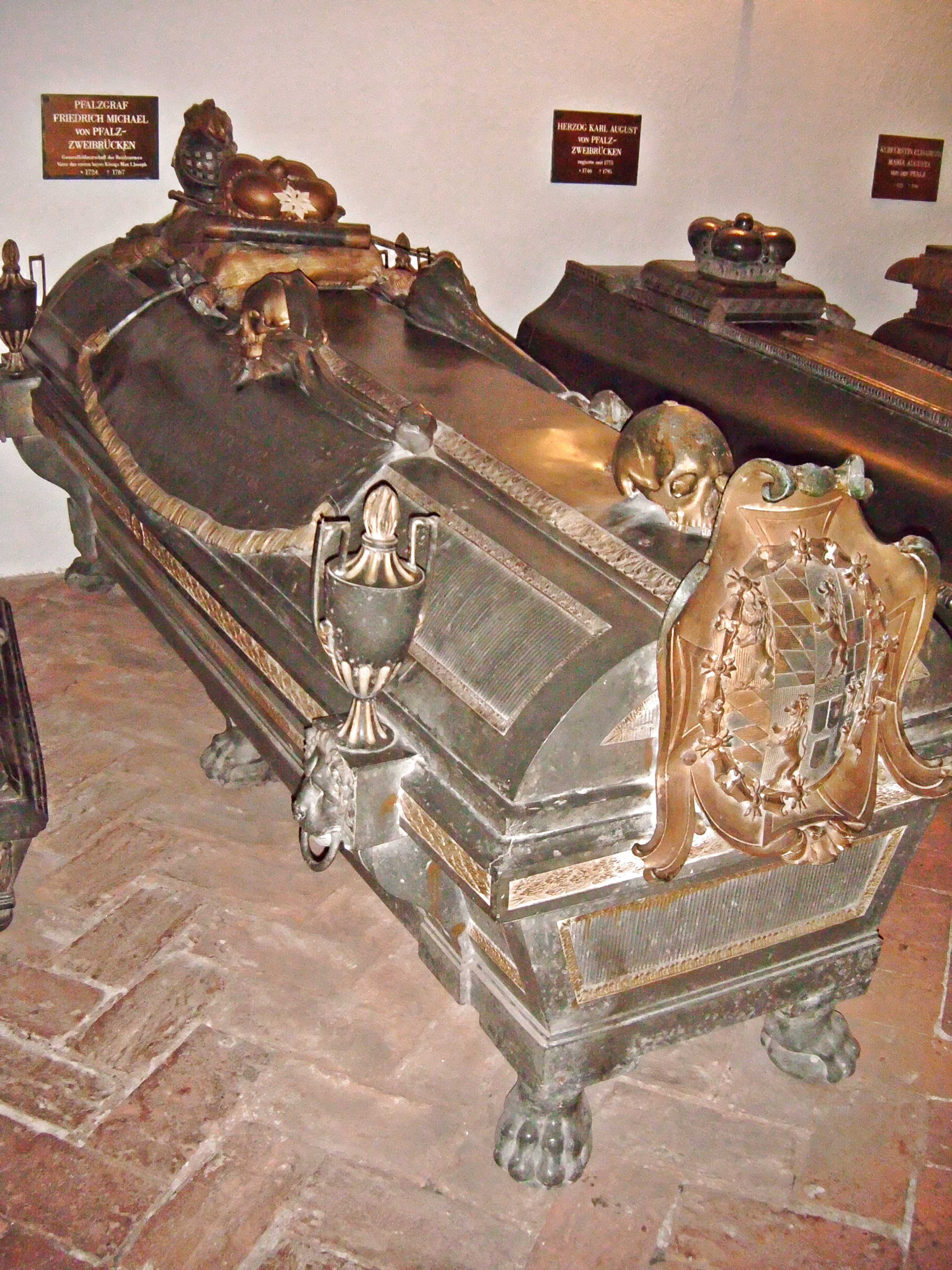 Friedrich Michael von Pfalz-Birkenfeld (1724-1767), Vater des Bayerischen Königs Max I. Joseph. Sarkophag in der St. Michaelskirche München.